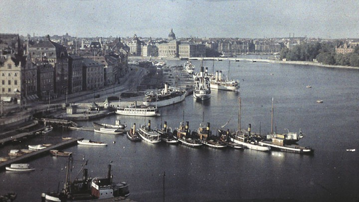 Skeppsbron och Strömmen från söder (bilden är beskuren)